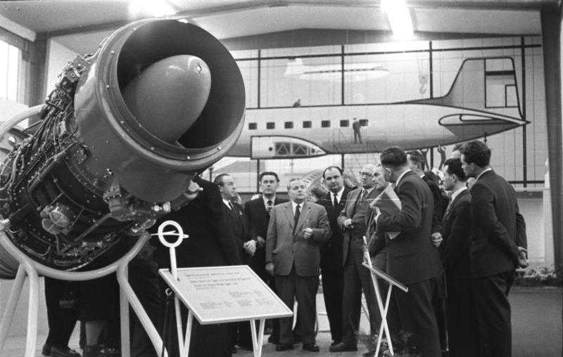 Zentralbild/Ulmer/Schmidt 4.3.1958, Leipziger Frühjahrsmesse 1958 Luftfahrtexperten der sozialistischen Länder trafen sich in Leipzig Uneingeschränkte Anerkennung zollten sich am 4.3.1958 die technischen Leiter der Luftfahrtgesellschaften Polens, Ungarns, Bulgariens, Rumäniens und der CSR während eines Empfangs in Leipzig den Leistungen der DDR Flugzeugindustrie. Ubz: Der Chefkonstrukteur und Werkdirektor des VEB Entwicklungswerke Pirna, Prof. Ing. Scheinost (5.v.l.) erklärt den ausländischen Experten das Turbinenluftstrahltriebwerk für das Passagierflugzeug 152 53500/185 N